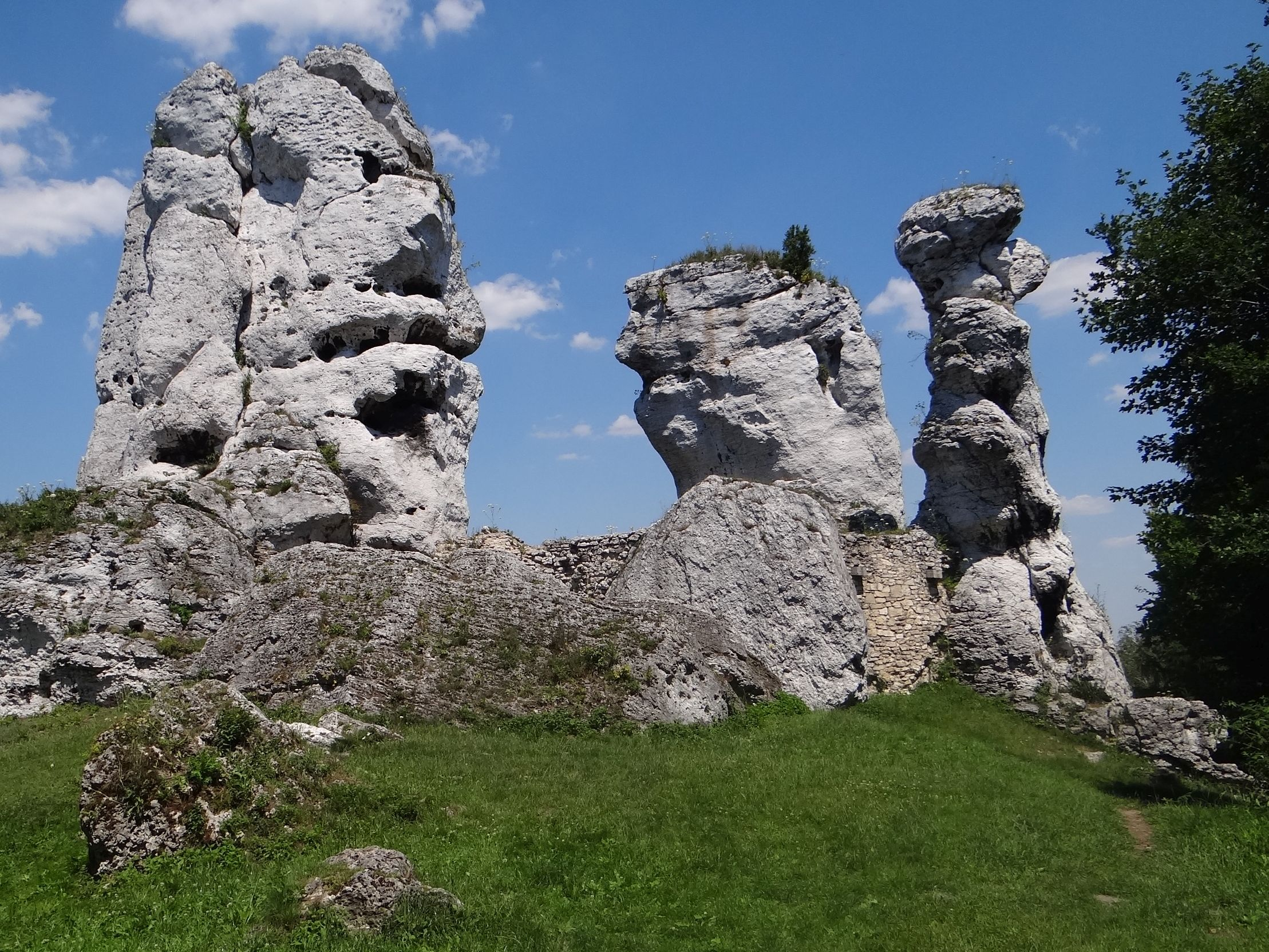 Skały Dwie Siostry i Niedźwiedź na Zamku Ogrodzieniec w miejscowości Podzmcze